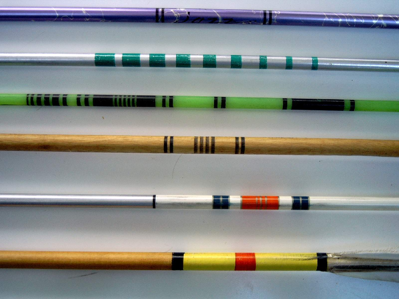 Crestings an Pfeilschäften